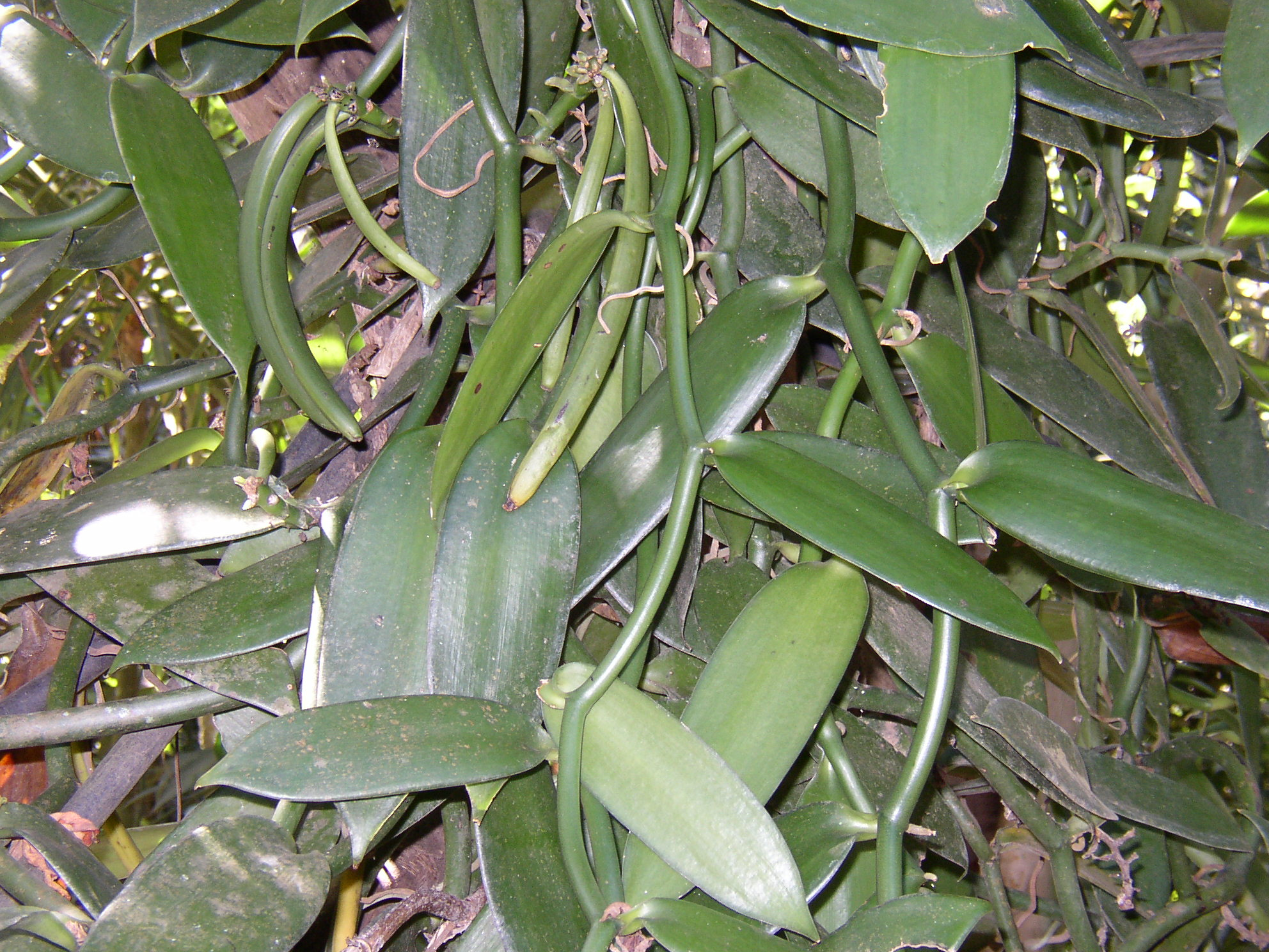 Vanille aus der Nähe